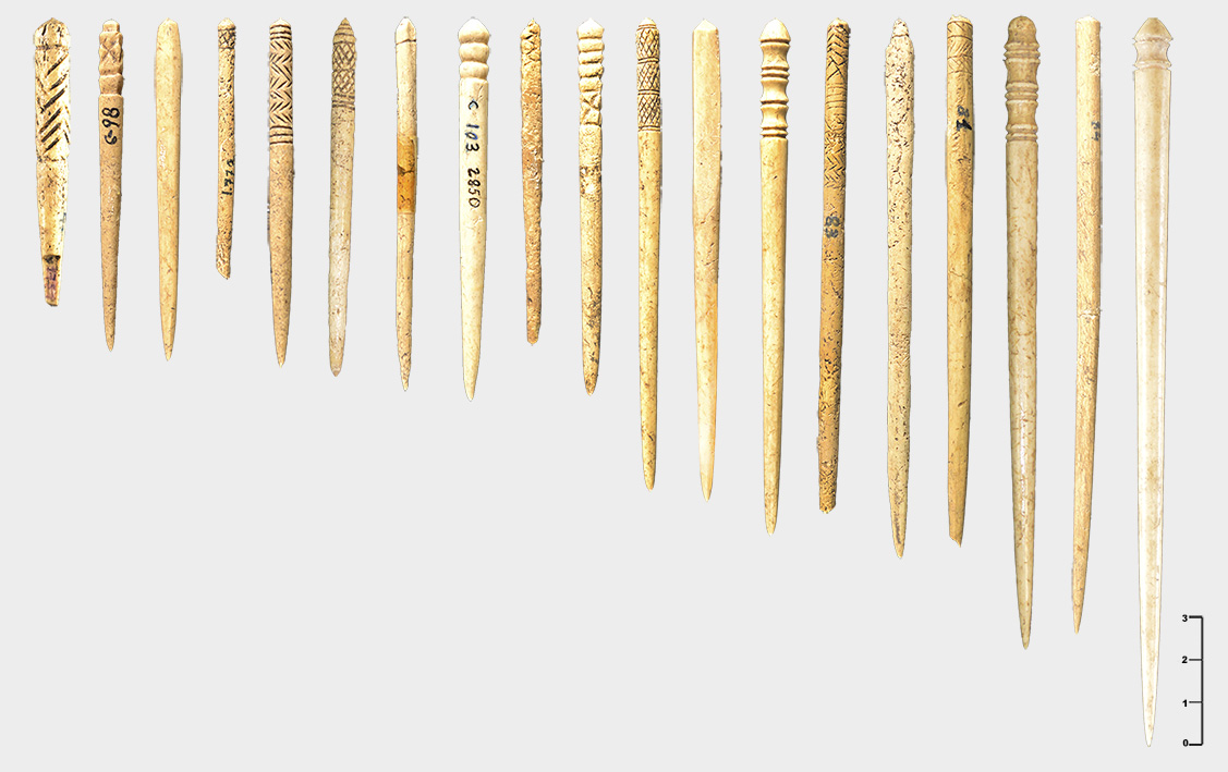 Alfileres de hueso del yacimiento ibérico de la Covalta.